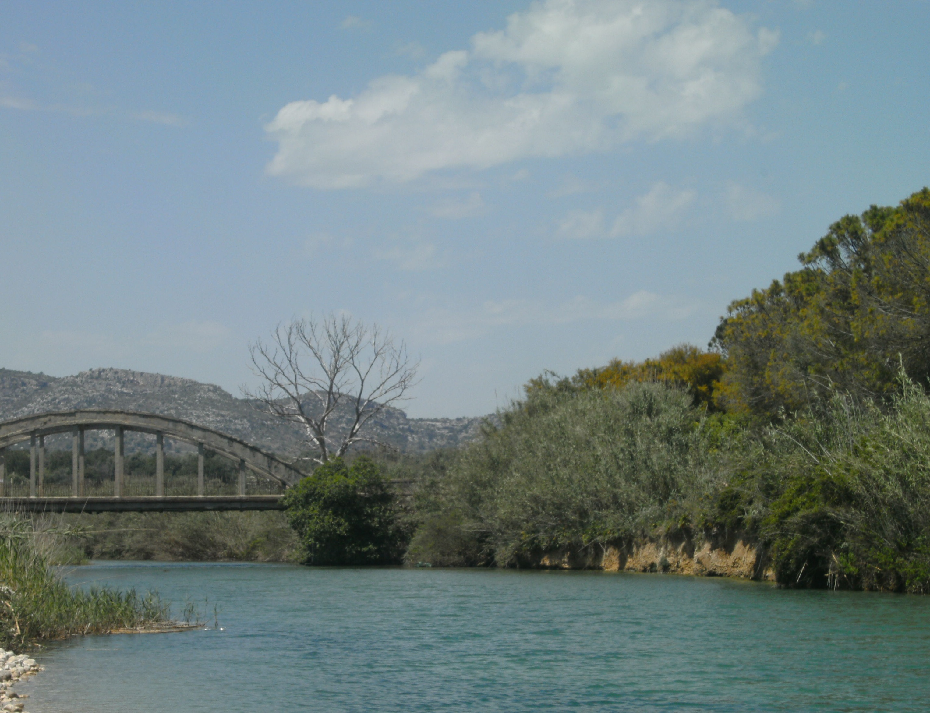 Il fiume Cassibile (Sicilia), sullo sfondo i Monti Iblei.